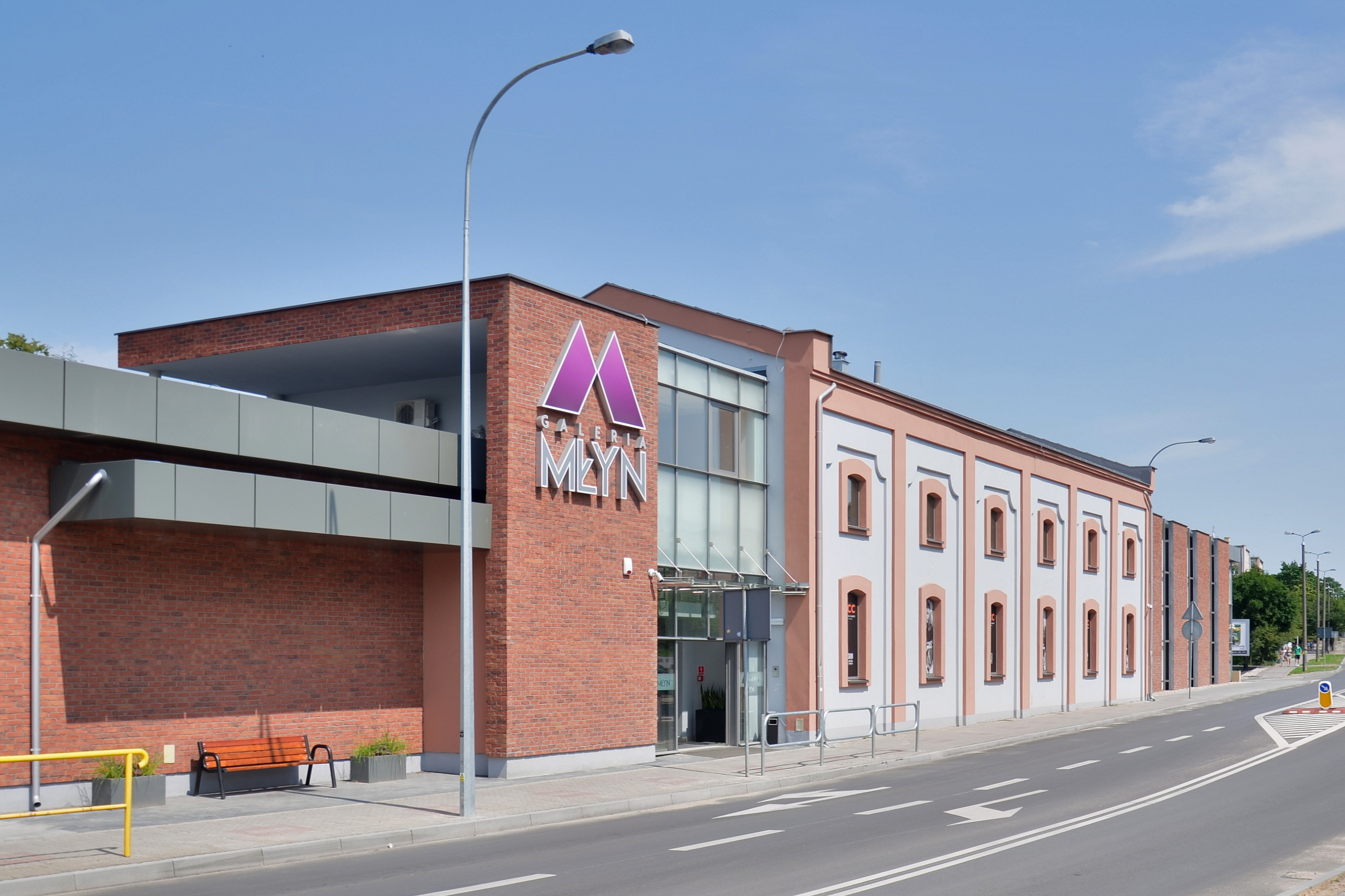 Galeria handlowa Młyn, dawny młyn zbożowy z 1900 r.